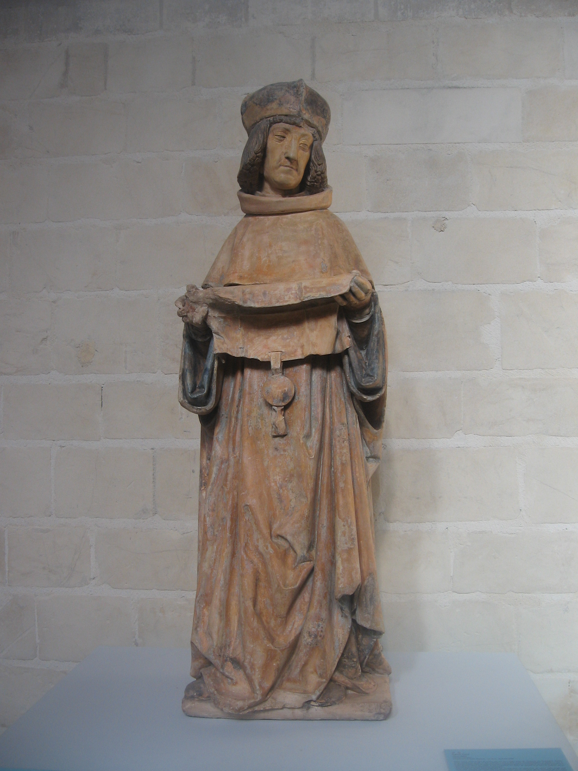 Exposition "Le Beau XVIe siècle". Saint Yves Vers 1500 Statue, calcaire Chaumont (Haute-Marne) - Classé monument historique le 08.02.1908.